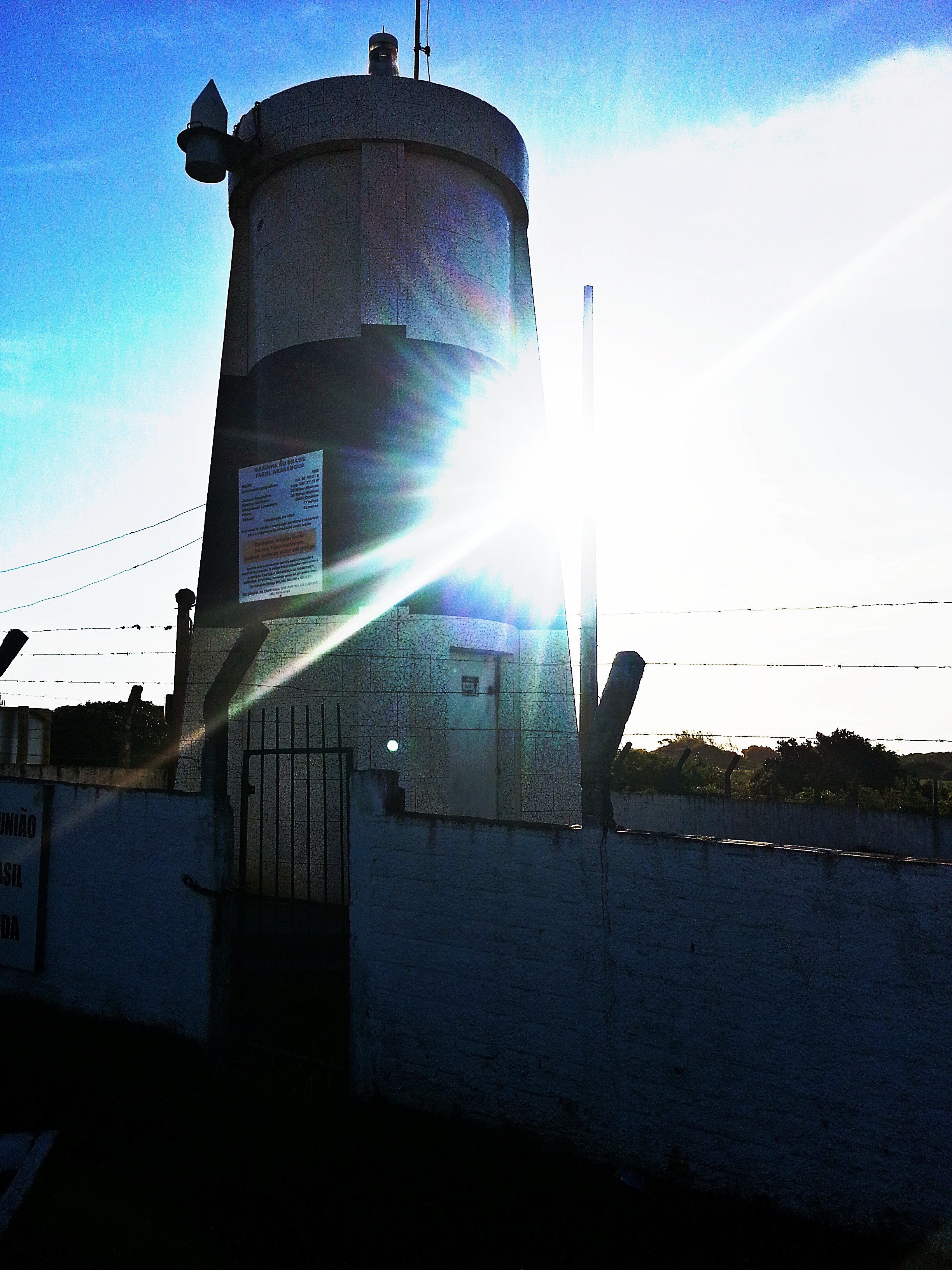 Morro dos Conventos, Araranguá - Santa Catarina.